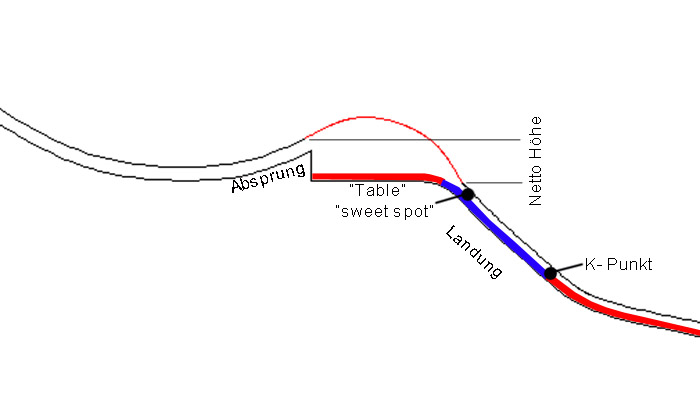 Kicker Zeichnung